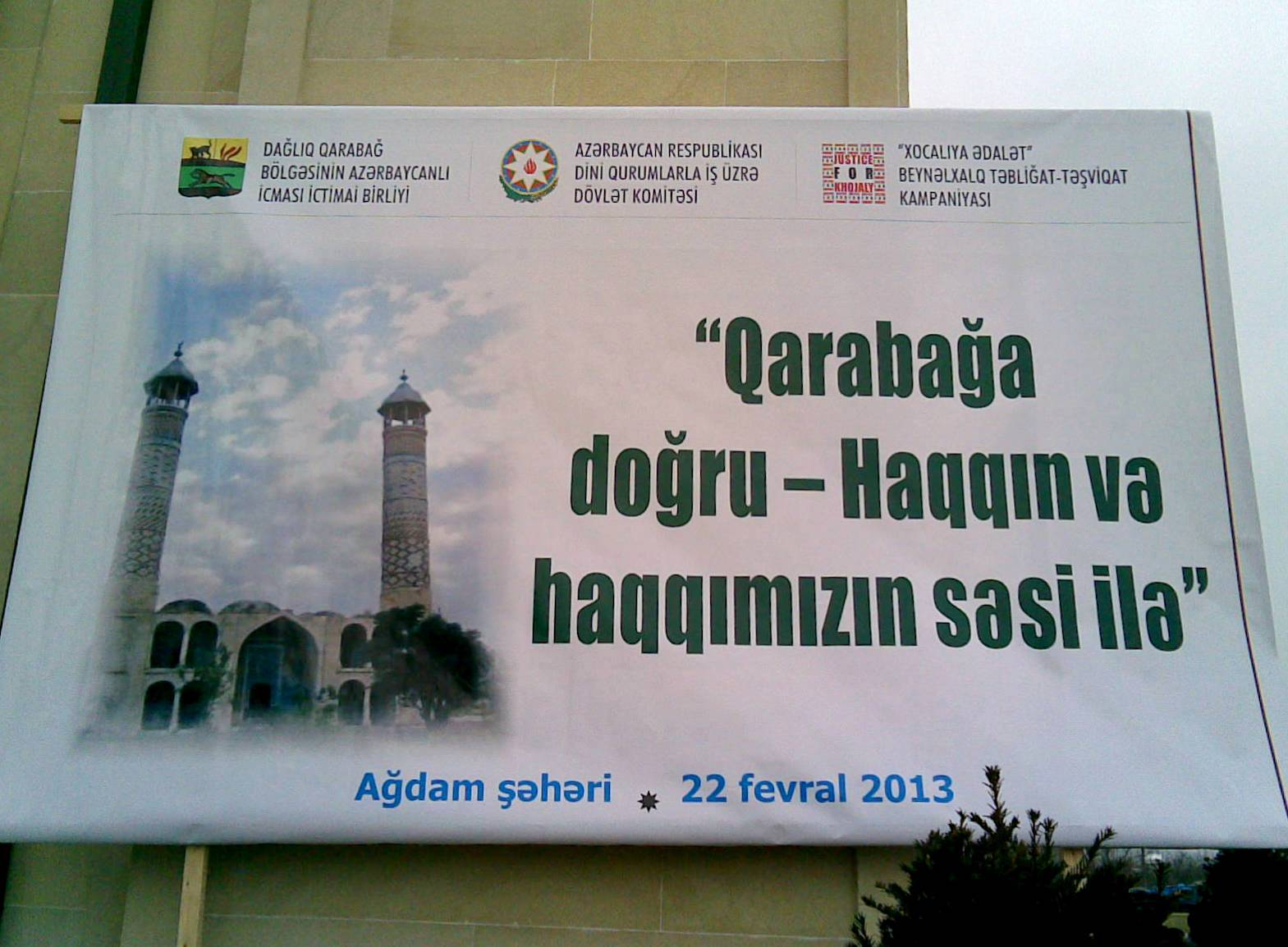 "Qarabağa doğru – Haqqın və haqqımızın səsi ilə" kampaniyası